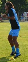 Berenguer lors d'un match amical du Tours FC contre Châteauroux (juillet 2013)